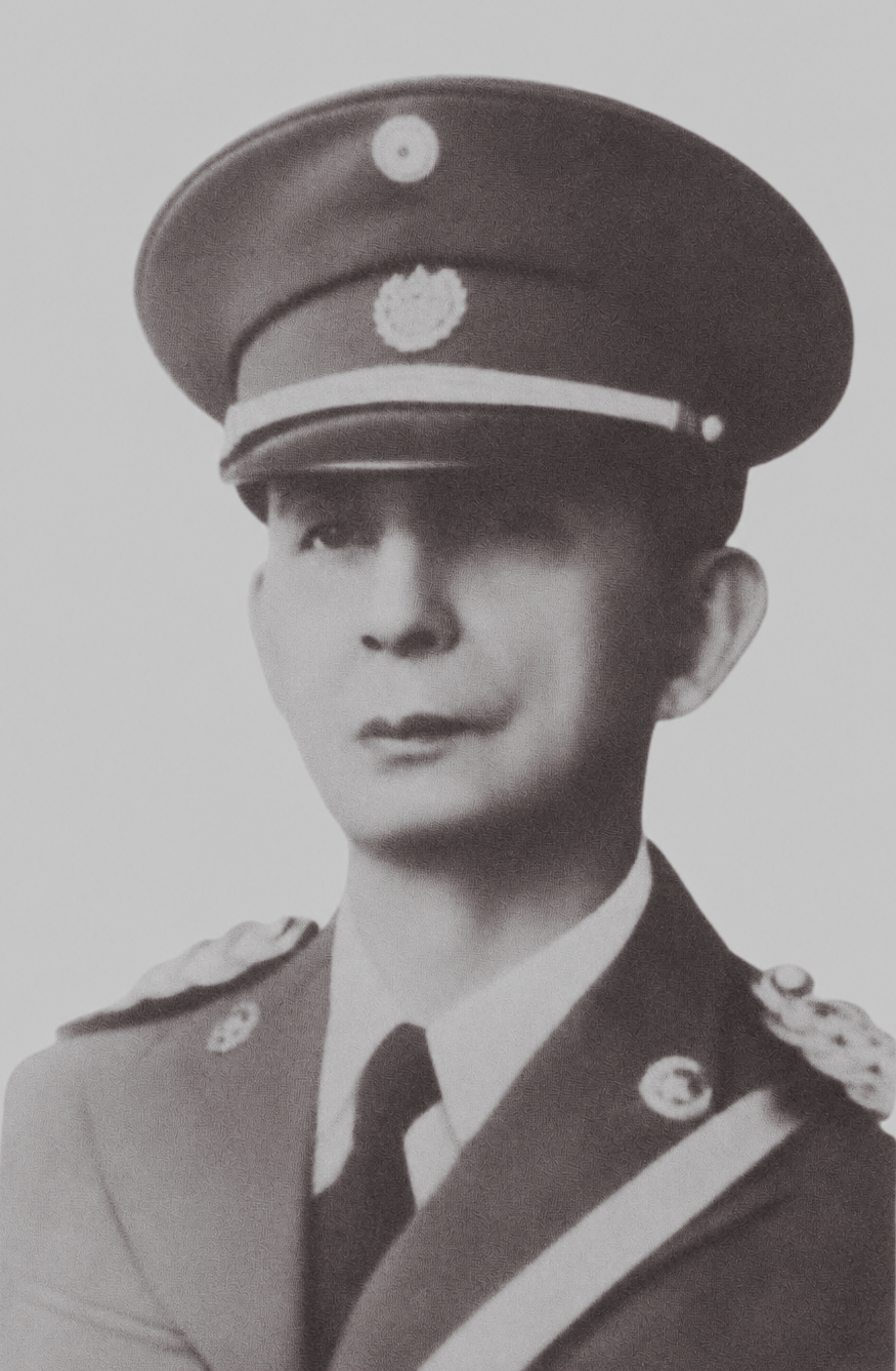 Coronel Osmin Aguirre, presidente de El Salvador entre 1944 y 1945.